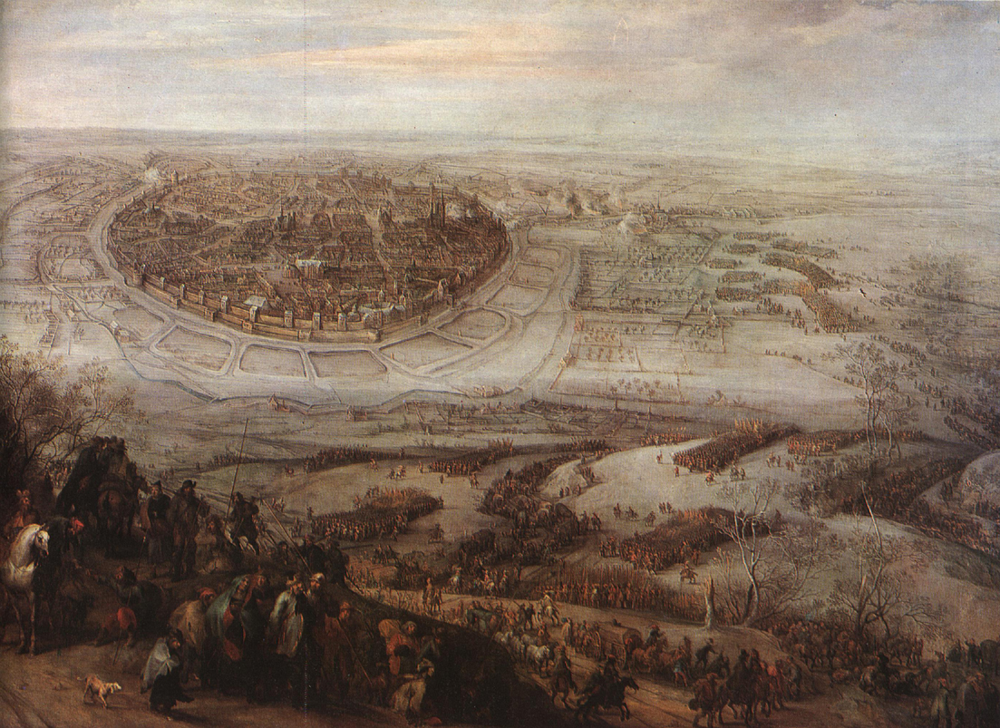 Der Entsatz von Freiberg in Meißen am 27. Februar 1643label QS:Lde,"Der Entsatz von Freiberg in Meißen am 27. Februar 1643"